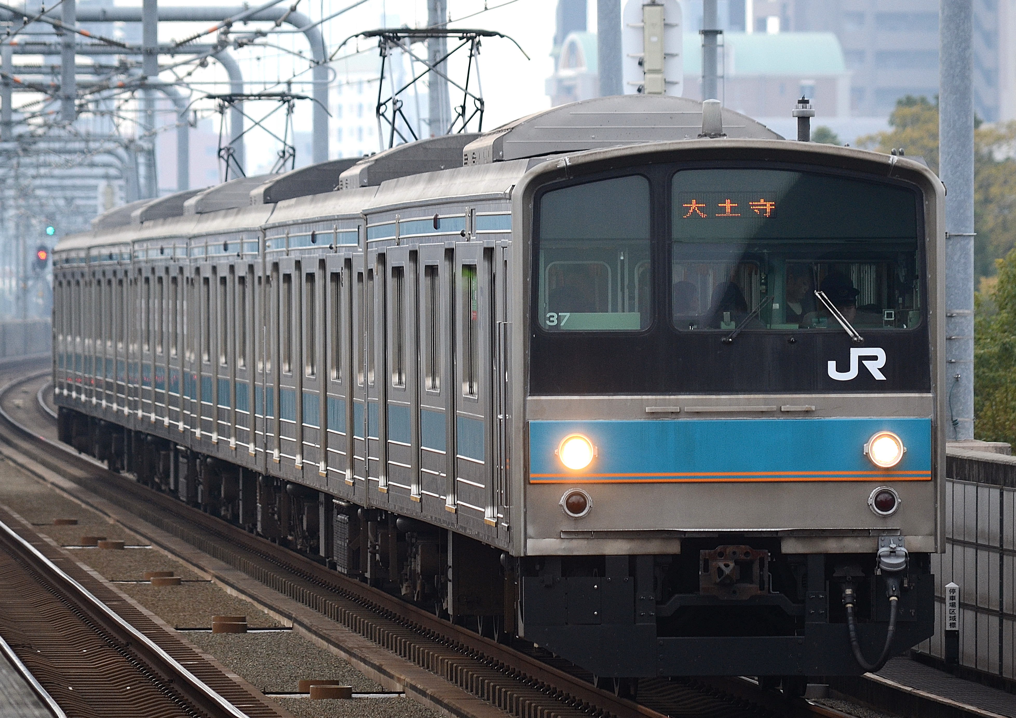 阪和線南田辺駅に到着する、0番台6両編成のHI編成。東海道本線での運用終了後に阪和線に転属した後にスカイブルー帯に戻され、新たに前面の帯下部と乗務員室扉の下部に細いオレンジのラインが2本追加された。